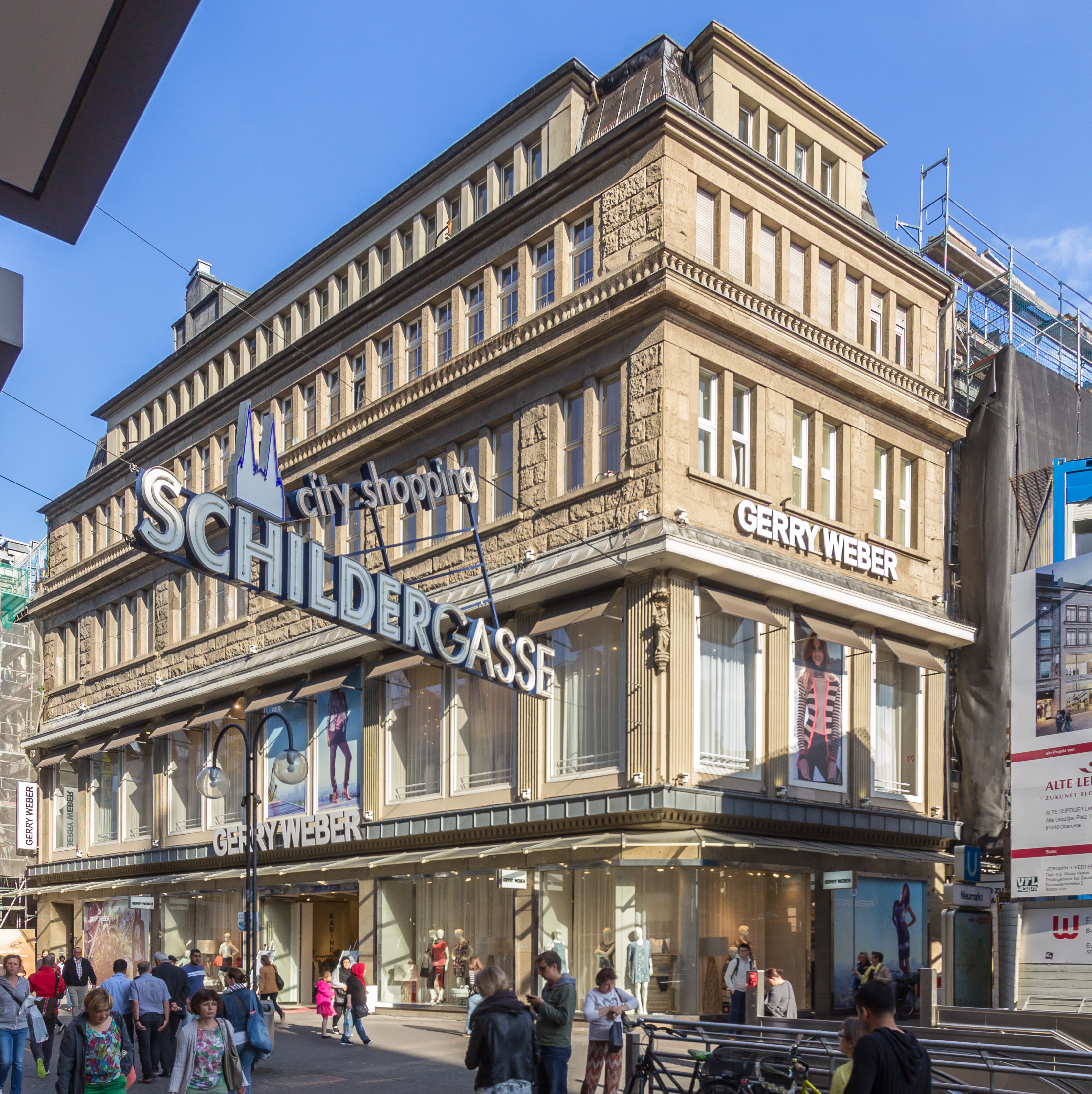 Denkmalgeschütztes Geschäftshaus Schildergasse 113-117, Köln: Ehemals „Haus Hindernburg“, Architekt: Hermann Pflaume. Errichtet: 1914/15 inschriftlich datiert. Im Erdgeschoss befindet sich eine Filiale von Gerry Weber